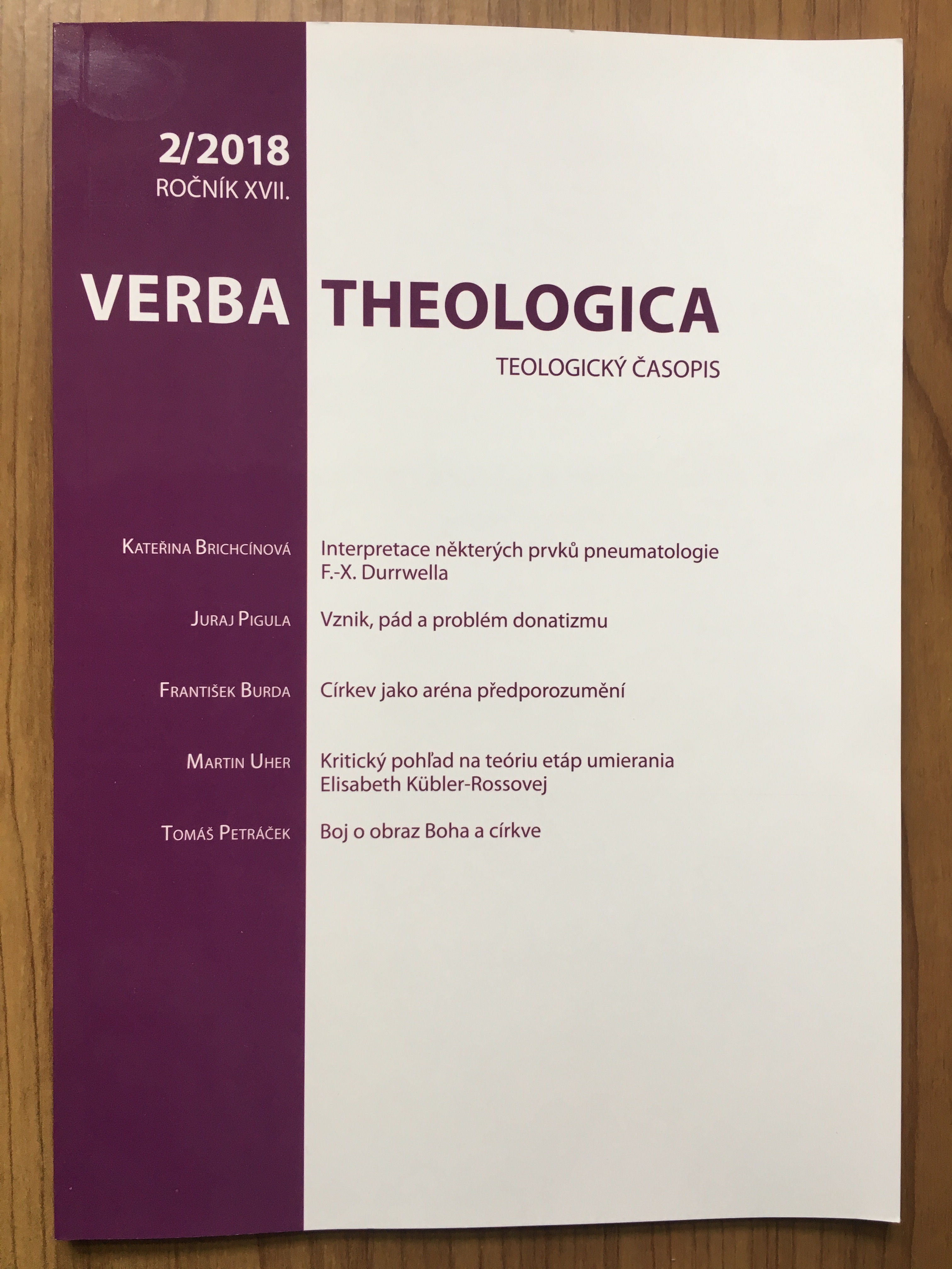 Časopis Verba Theologica, 2/2018.